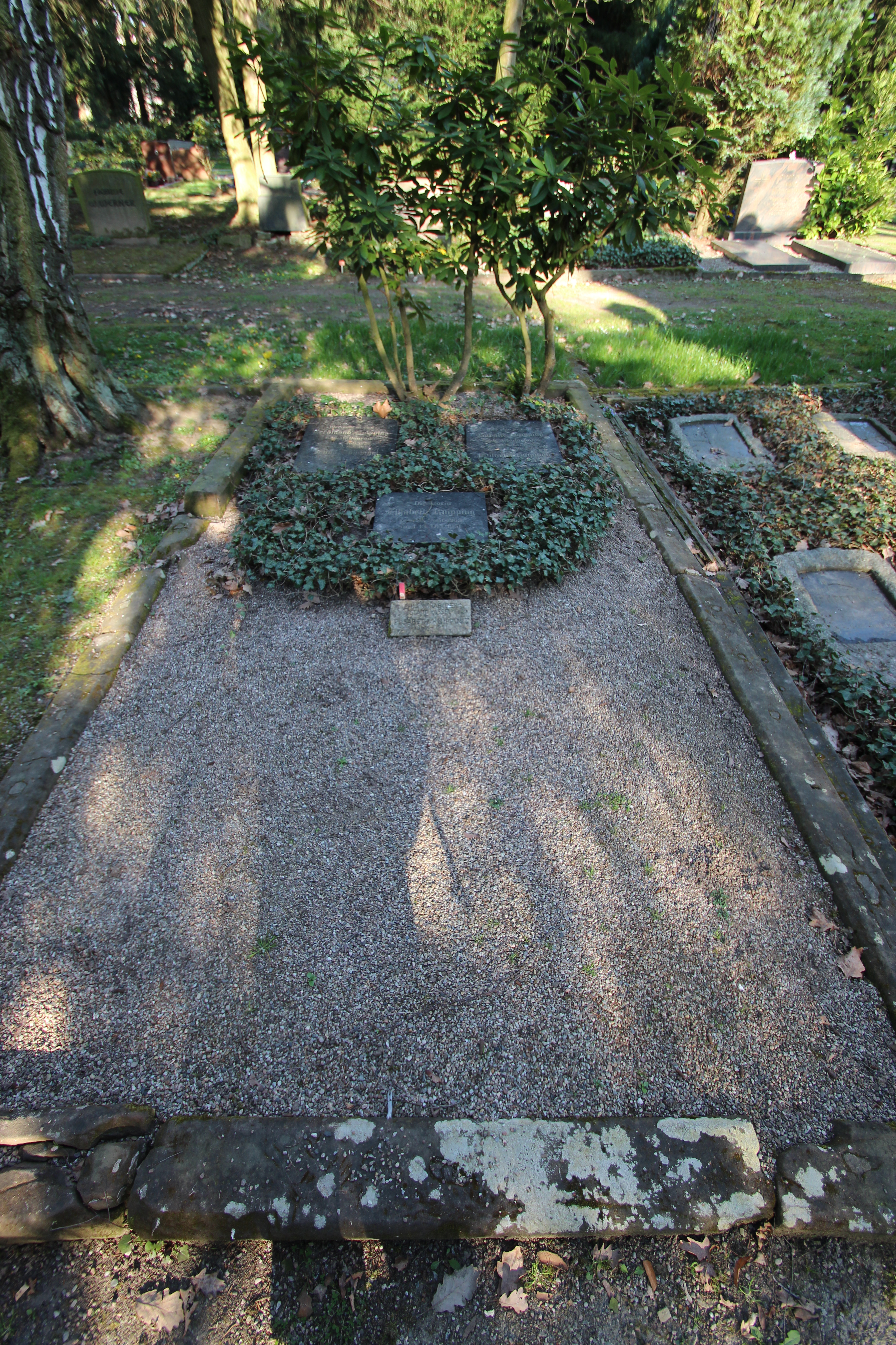 Grab von Elisabeth Knipping auf dem Hauptfriedhof Kassel.